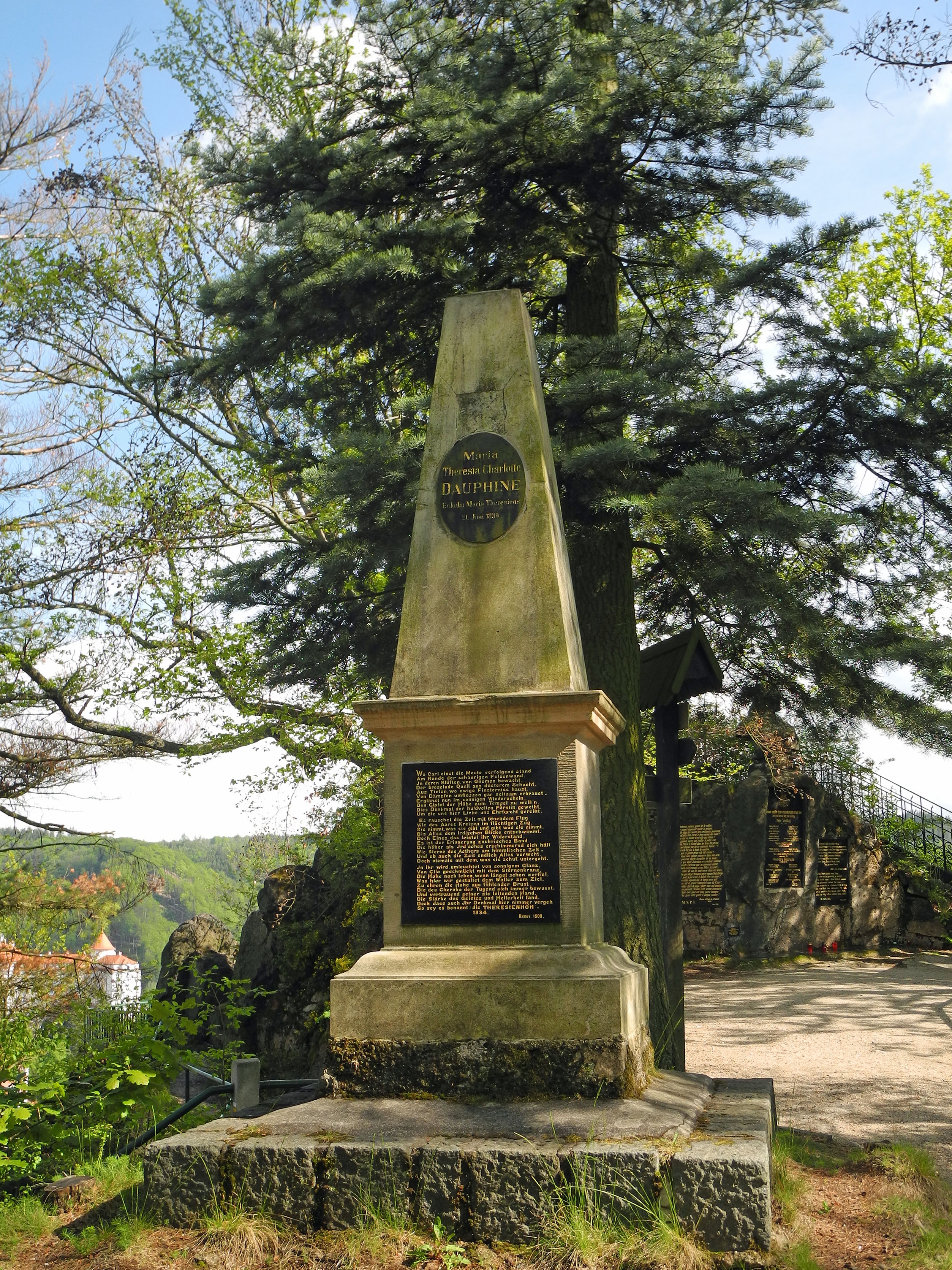 Denkmal auf der Theresienhöhe oberhalb von Karlsbad (Karlovy Vary), benannt nach Marie Thérèse Charlotte von Frankreich (1778–1851), die Karlsbad 1834 besuchte